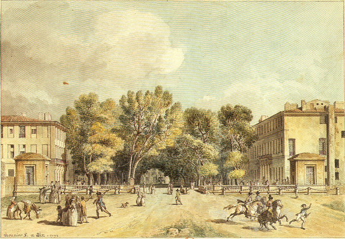 Vue de la principale entrée de la ville d'Aix, aquarelle